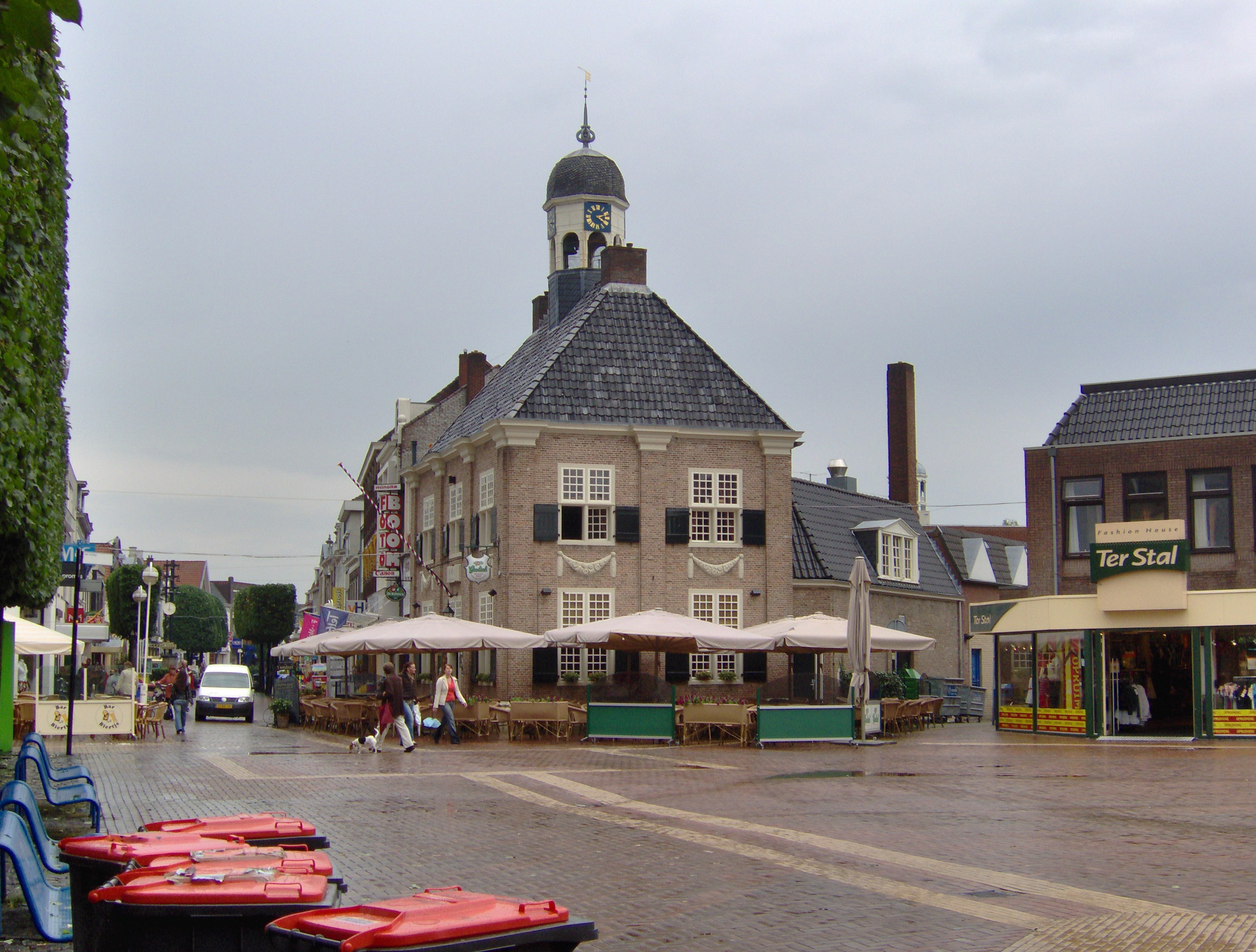 The square Koornmarkt in Almelo, Overijssel, The Netherlands